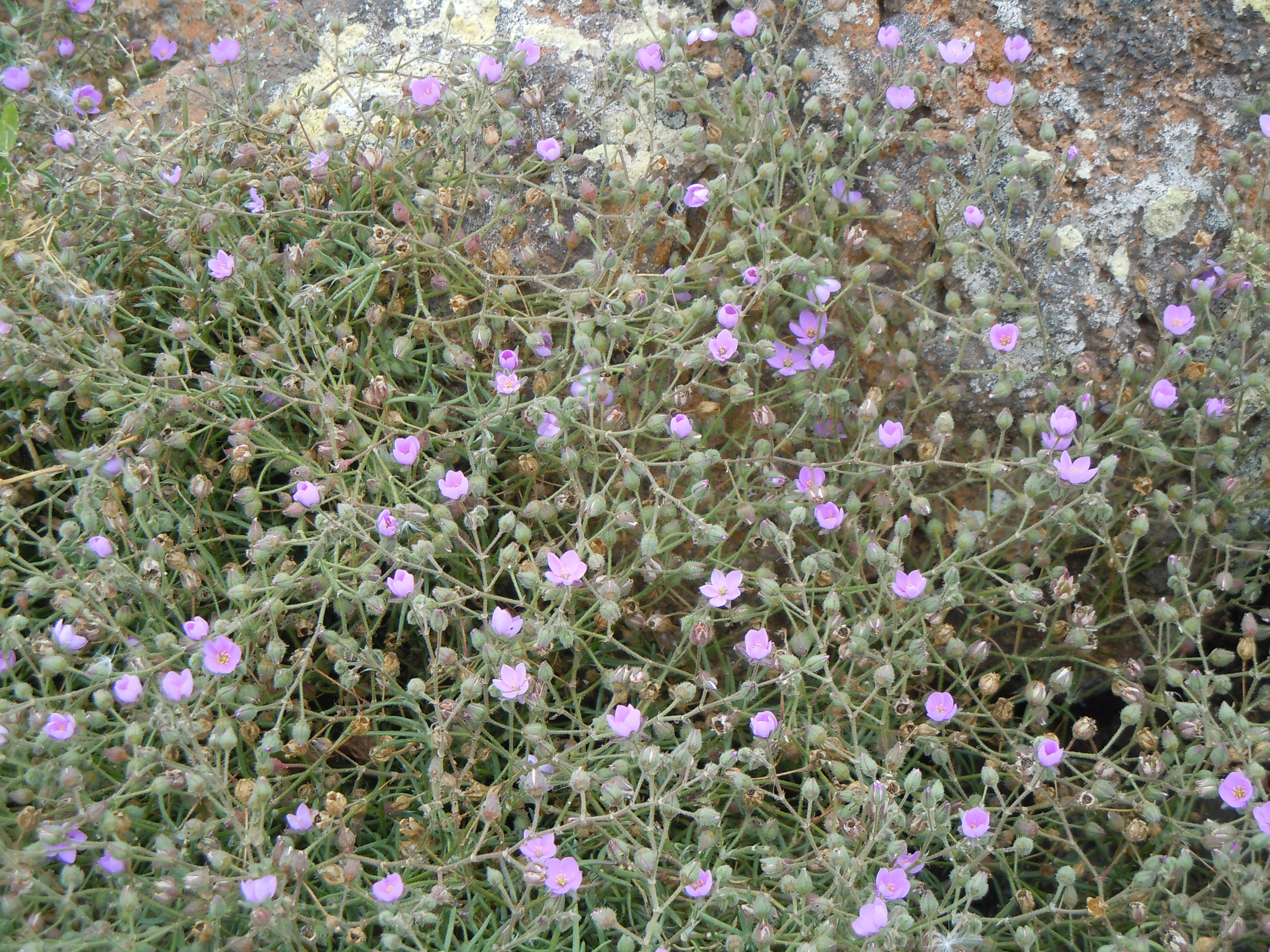 Spergula fimbriata au Mirador del Rio à Lanzarote